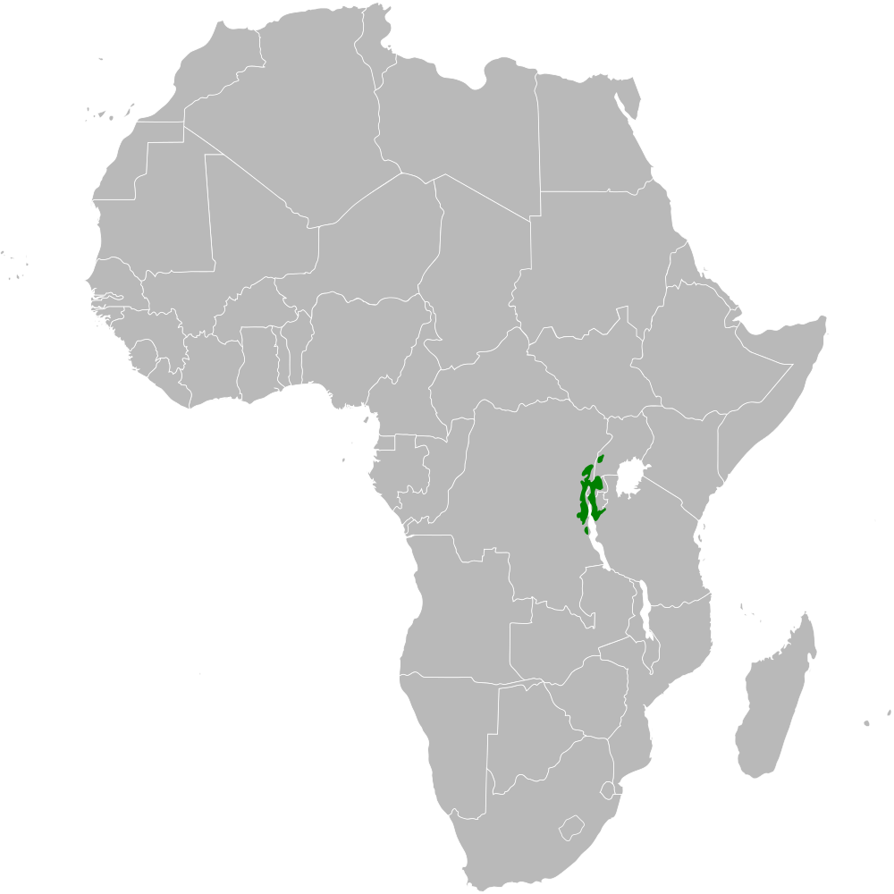 Parus fasciiventer distribution map